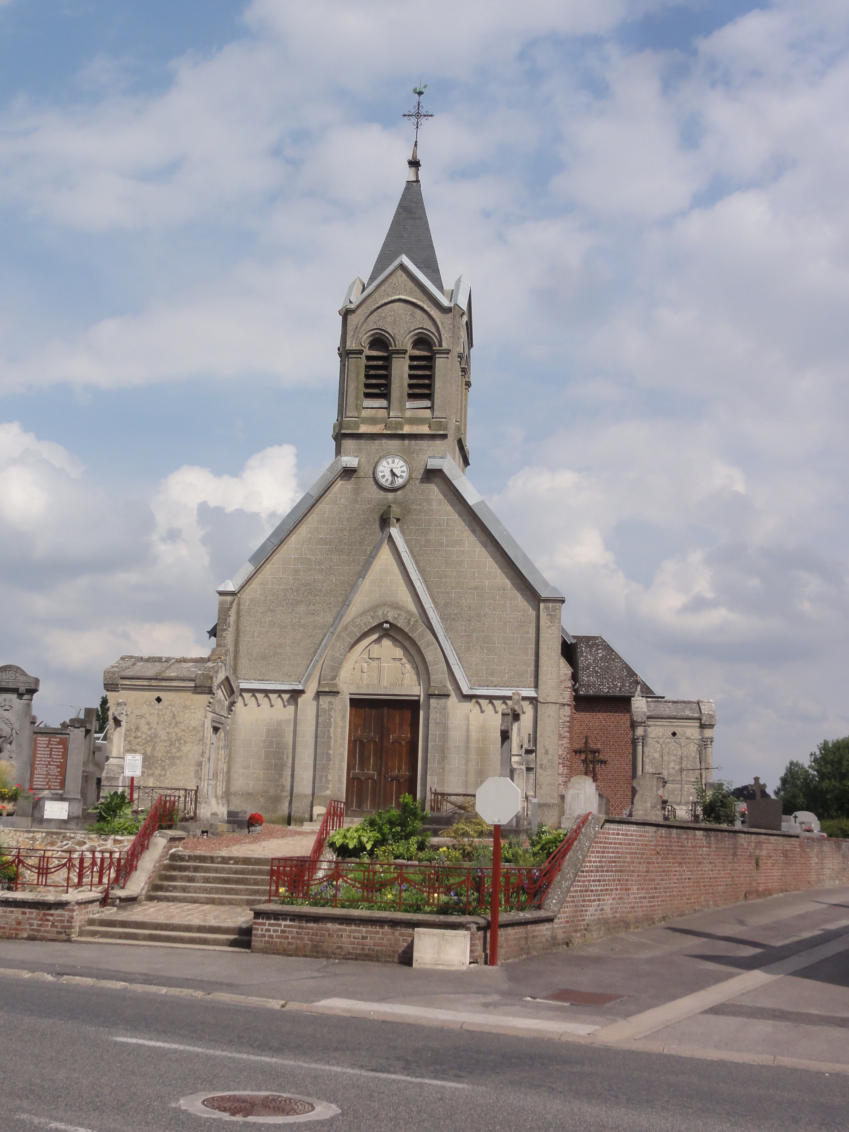 Omissy (Aisne) église